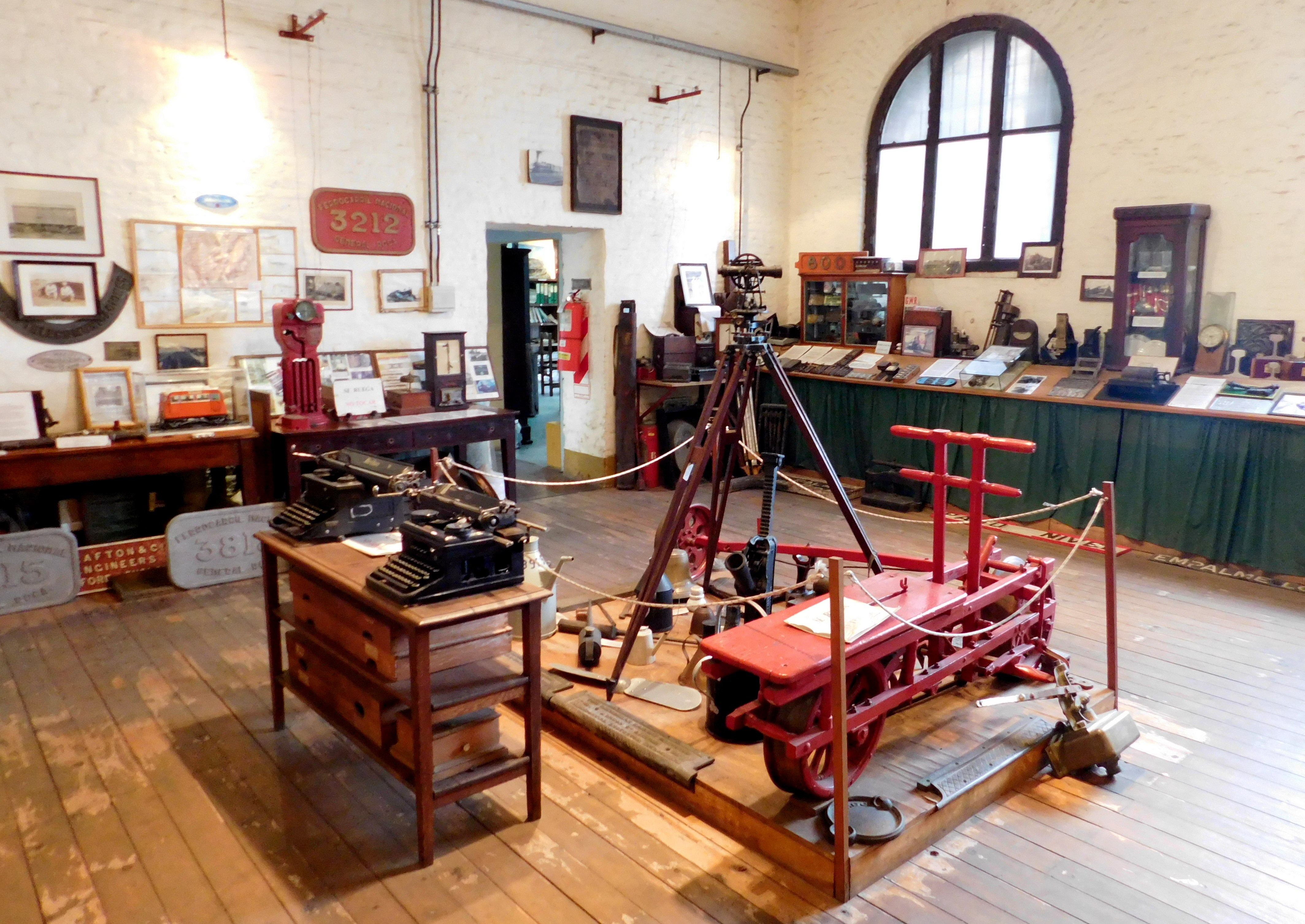 Ferroclub Argentino - Centro de Preservación Remedios de Escalada.